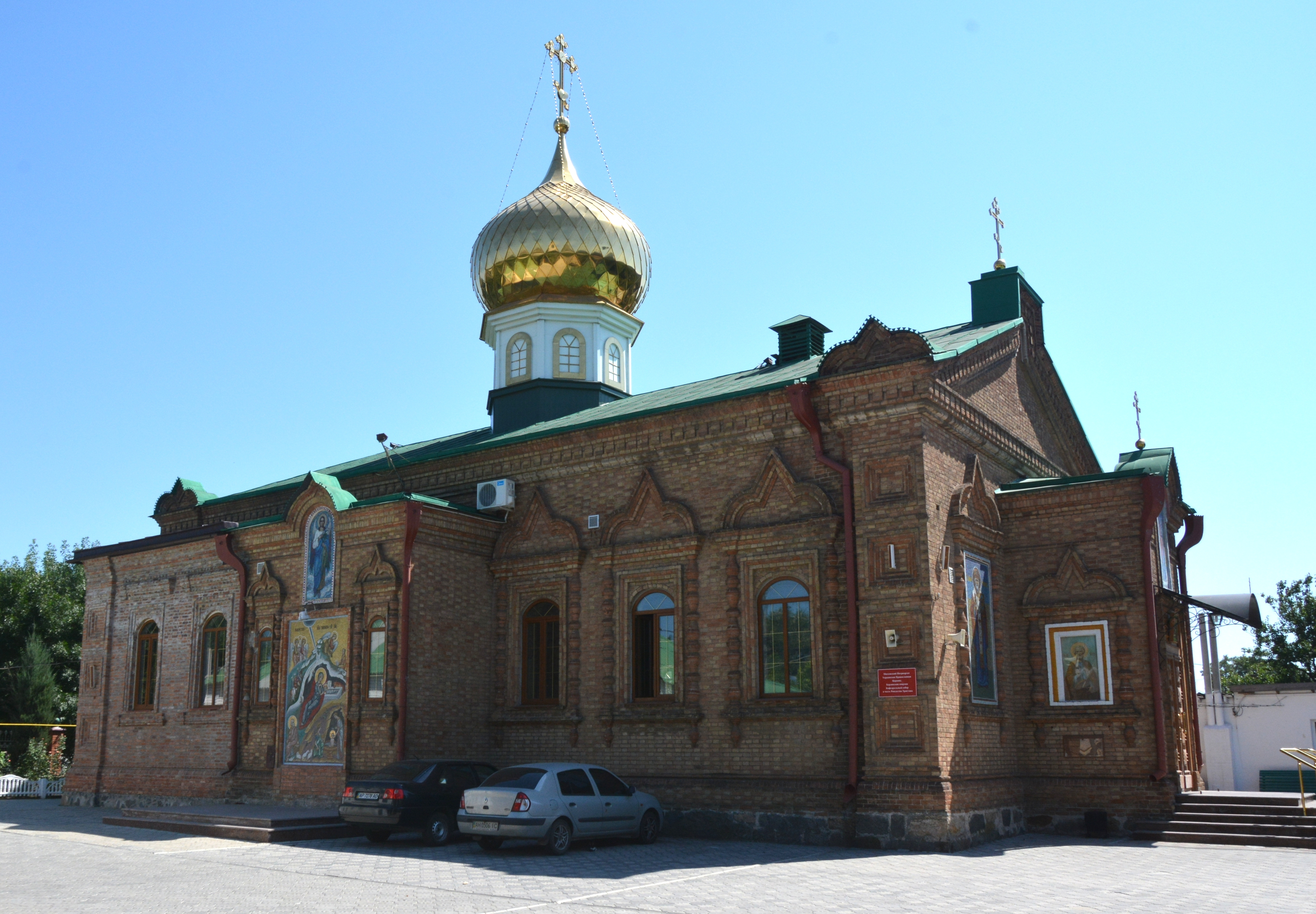 Старообрядницька церква, Бердянськ, вул. Шевченко, 30